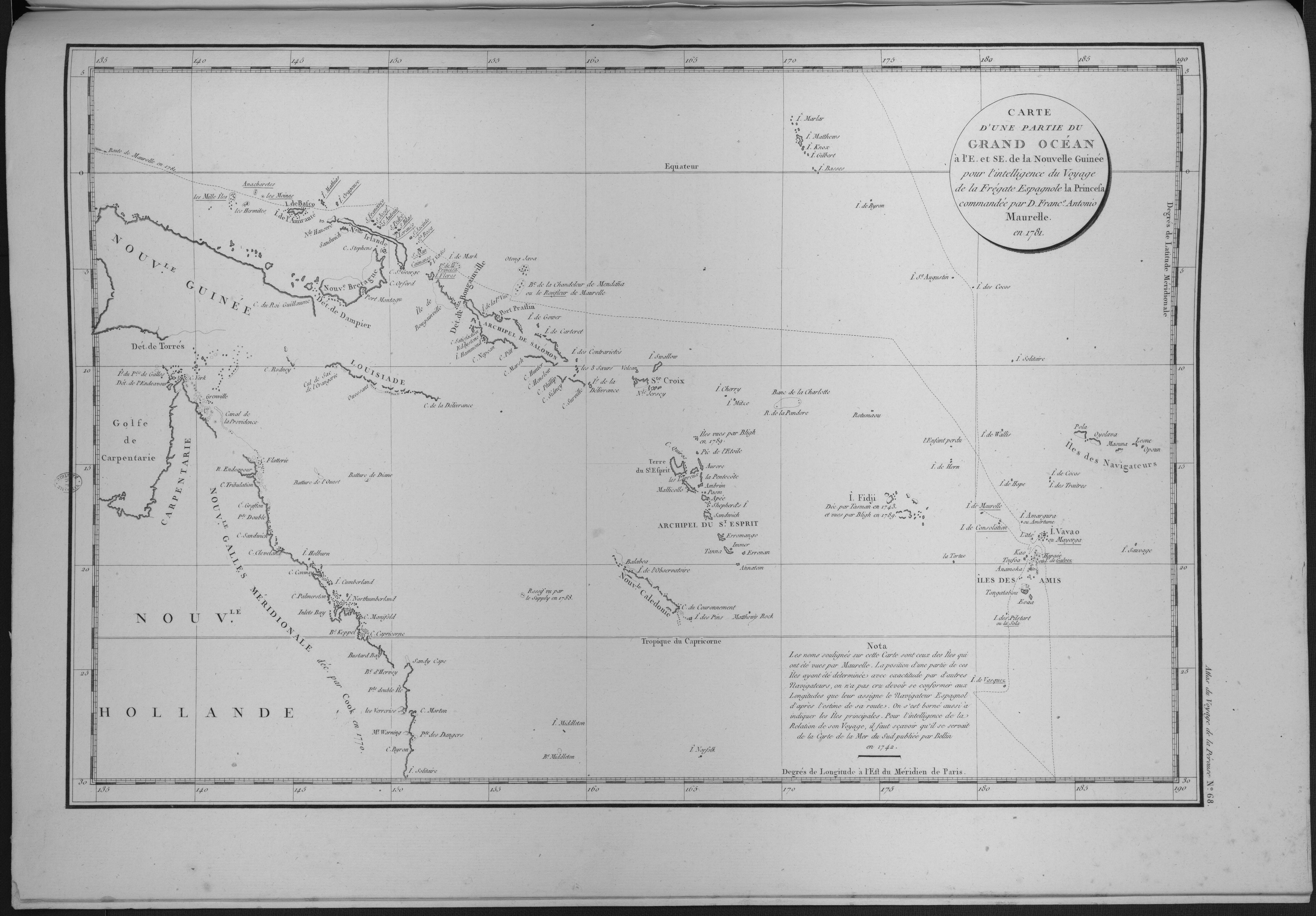 Atlas du voyage de La Pérouse